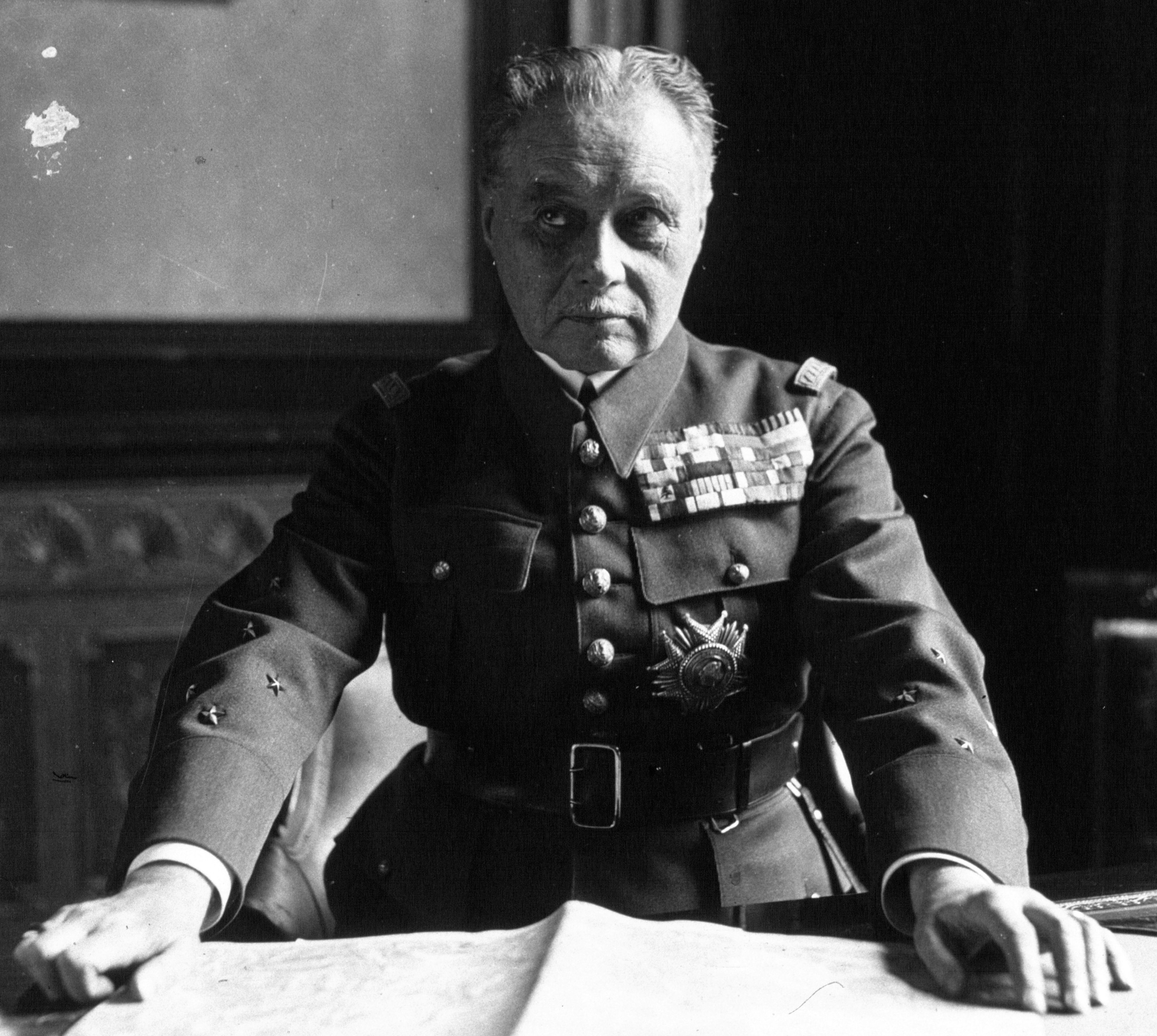 Le général Maurice Gamelin en 1936.